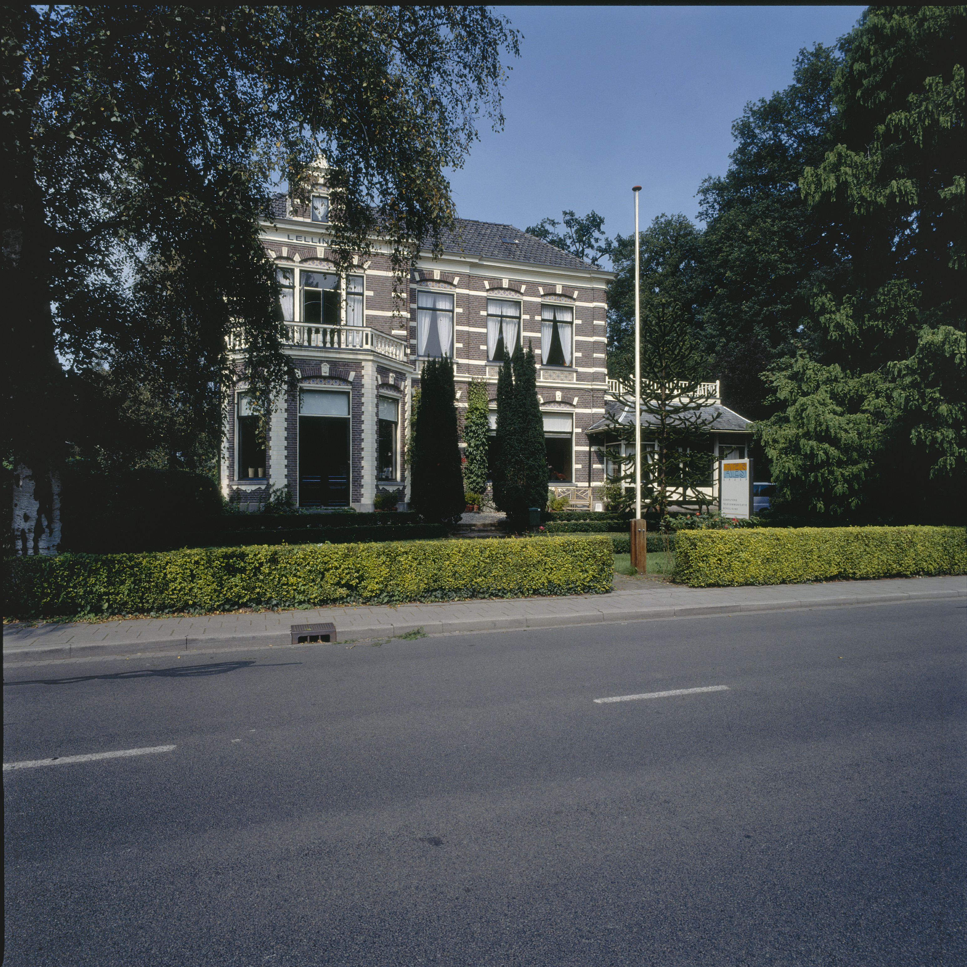 Lellingbo, vroeger Nieuw-Moerheim: Overzicht voorgevel villa